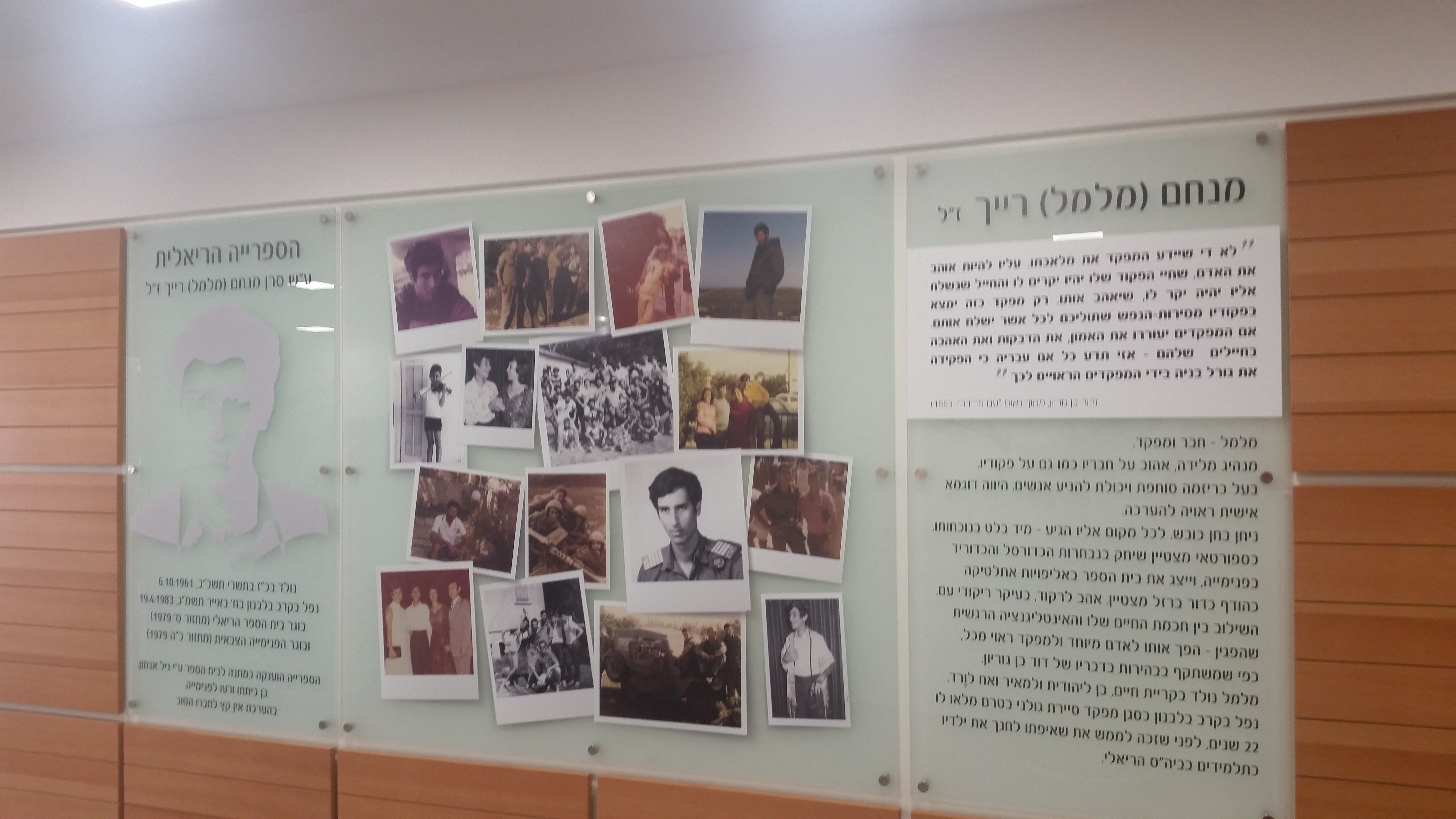 קמפוס בית בירם שוכן על הכרמל שייך לבית הספר הריאלי ספריית בית בירם. לוח הנצחה לבוגר בית הספק שהספרייה נקראת על שמו